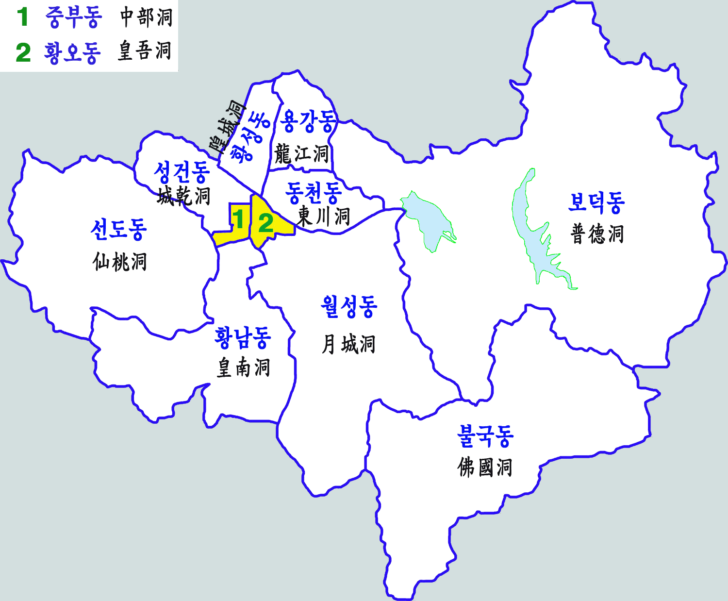 경주시 시내동지역도